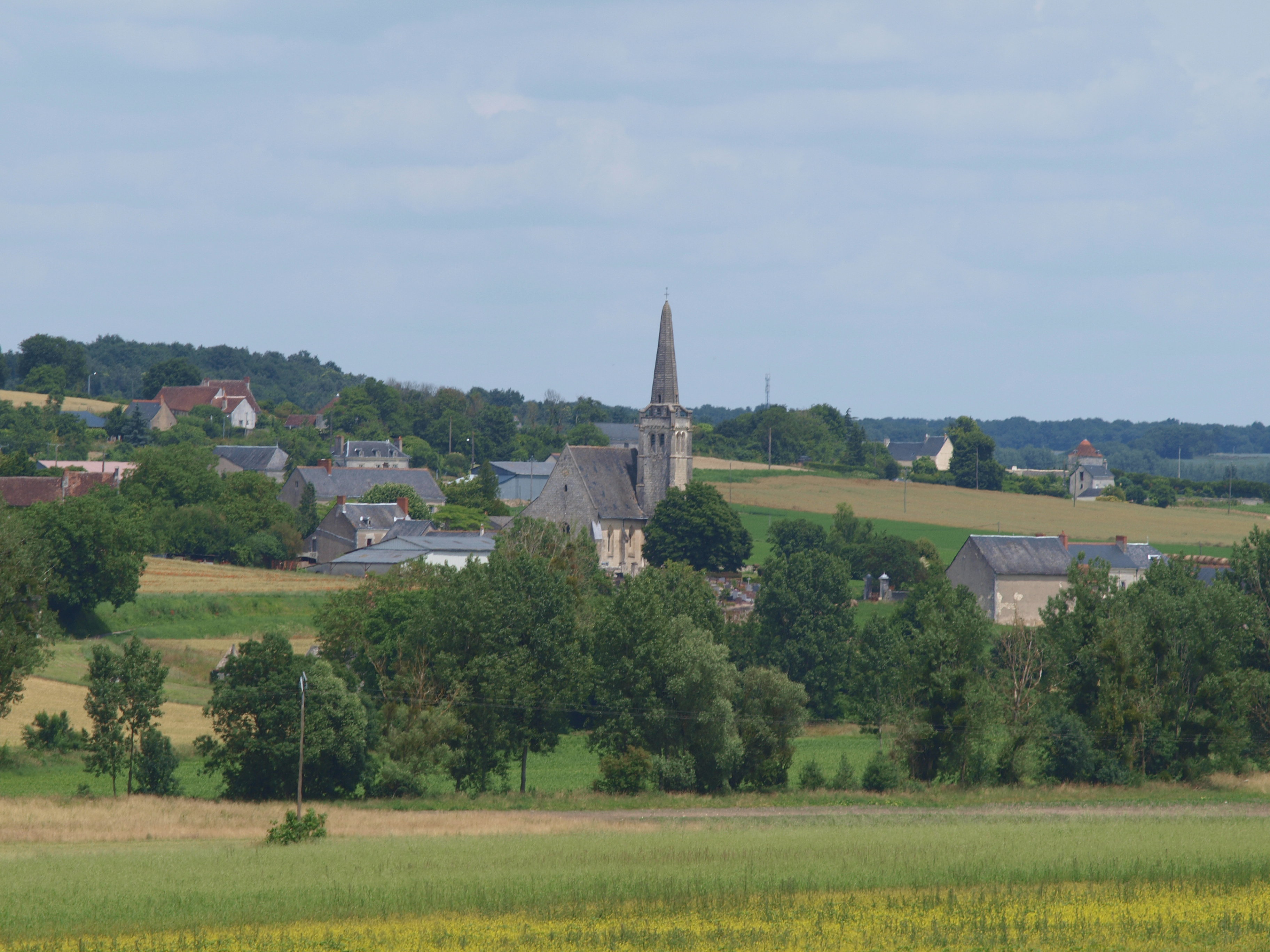 Crissay-sur-Manse (Indre-et-Loire, France)